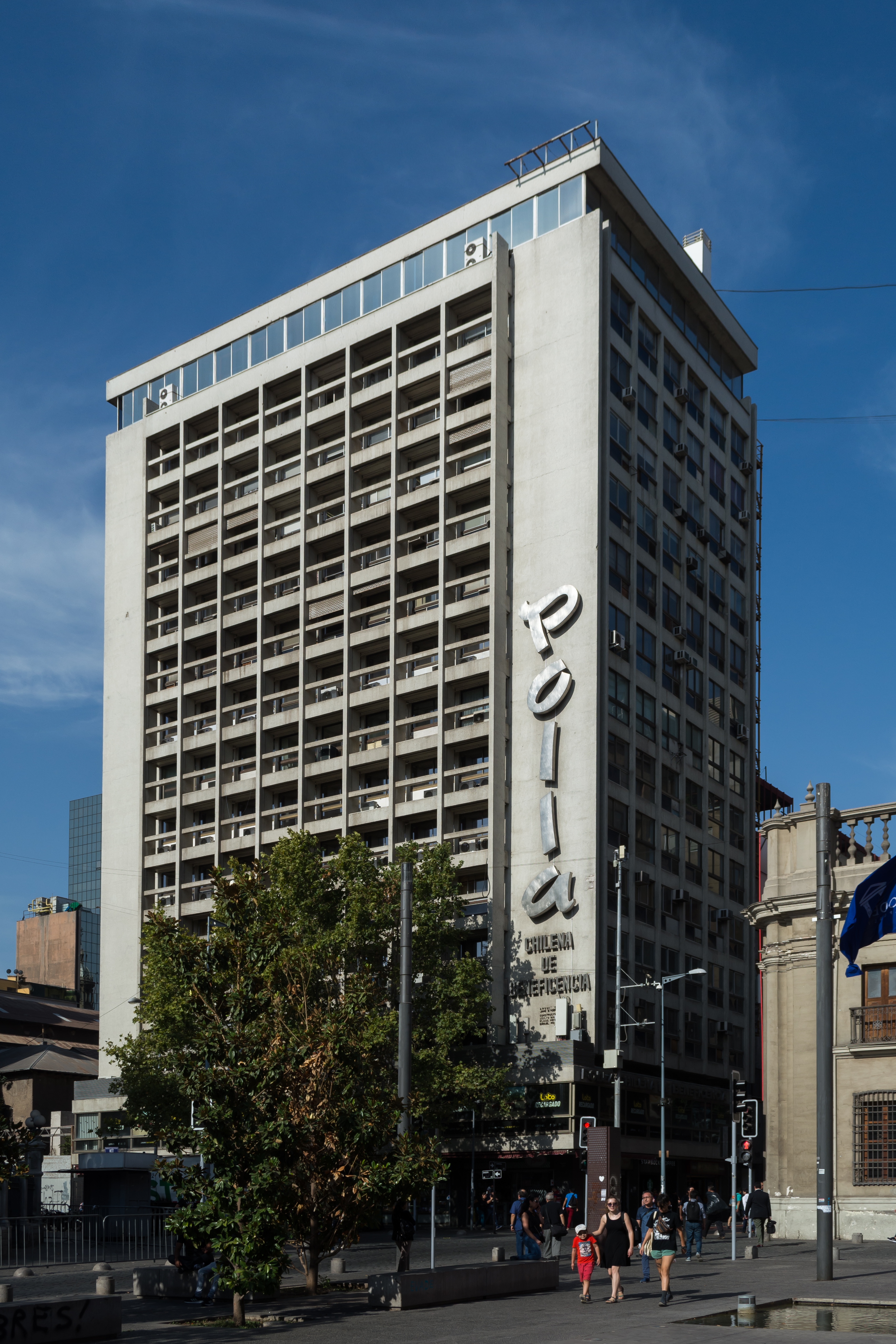 Edificio Polla Chilena de Beneficencia, Santiago, Región Metropolitana, Chile